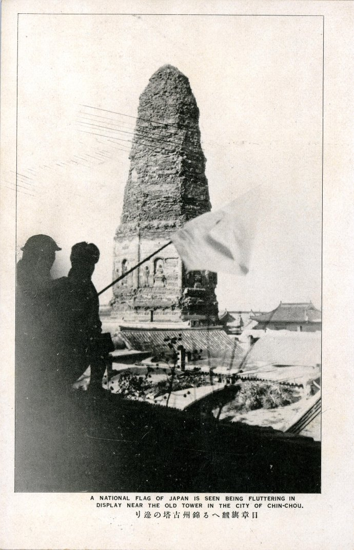 1931年9月18日事变后日军进占锦州的历史影像，出自1932年日本和歌山大正写真工艺所出版明信片《锦州方面活跃的皇军的威力》